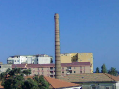 Torre Tonnina